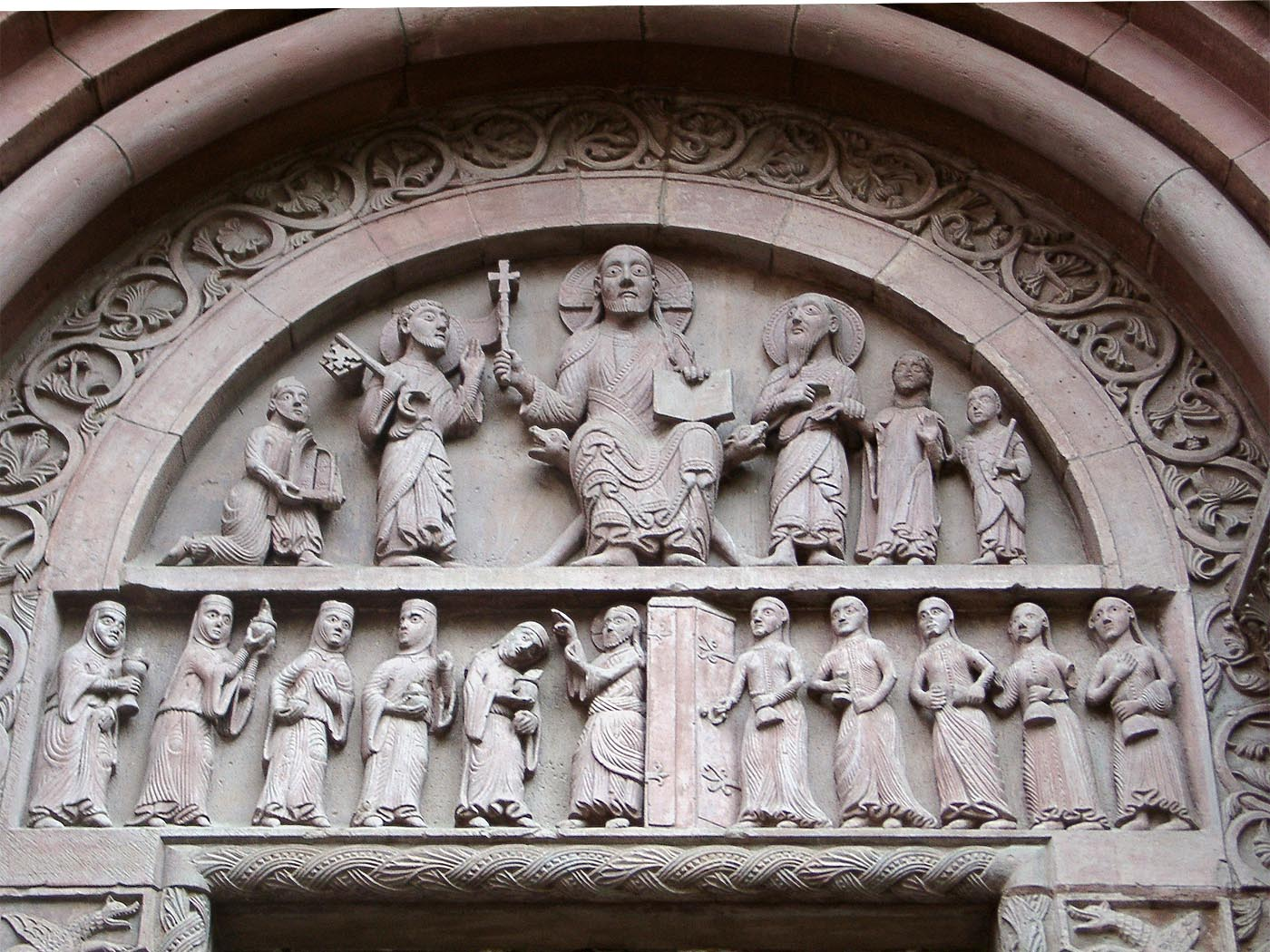 Tympanon der Galluspforte des Basler Münsters (Schweiz); Jüngstes Gericht, 1150/70